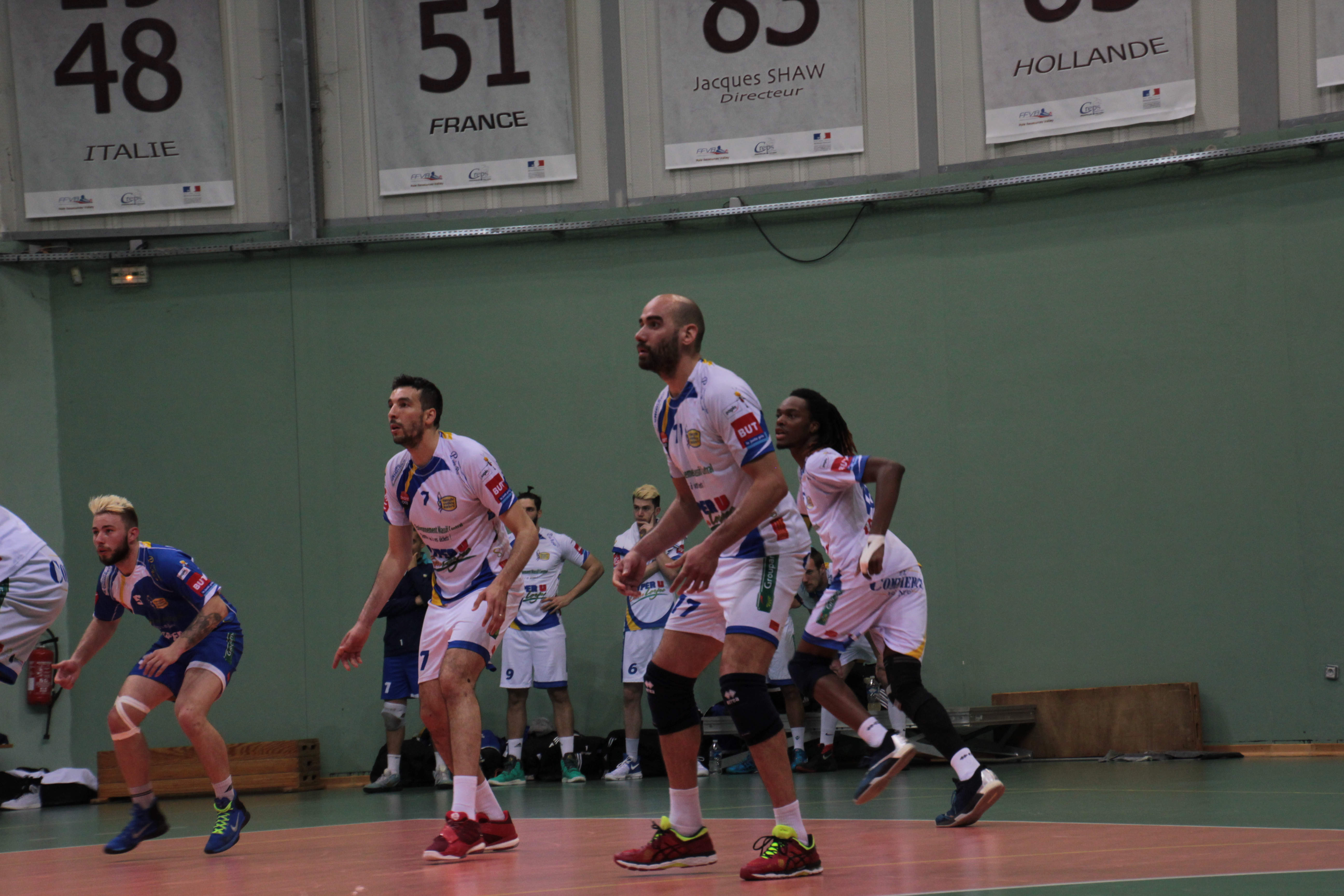 Une partie de l'équipe du Mende Volley Lozère (France, Elite) pour la saison 2016-2017